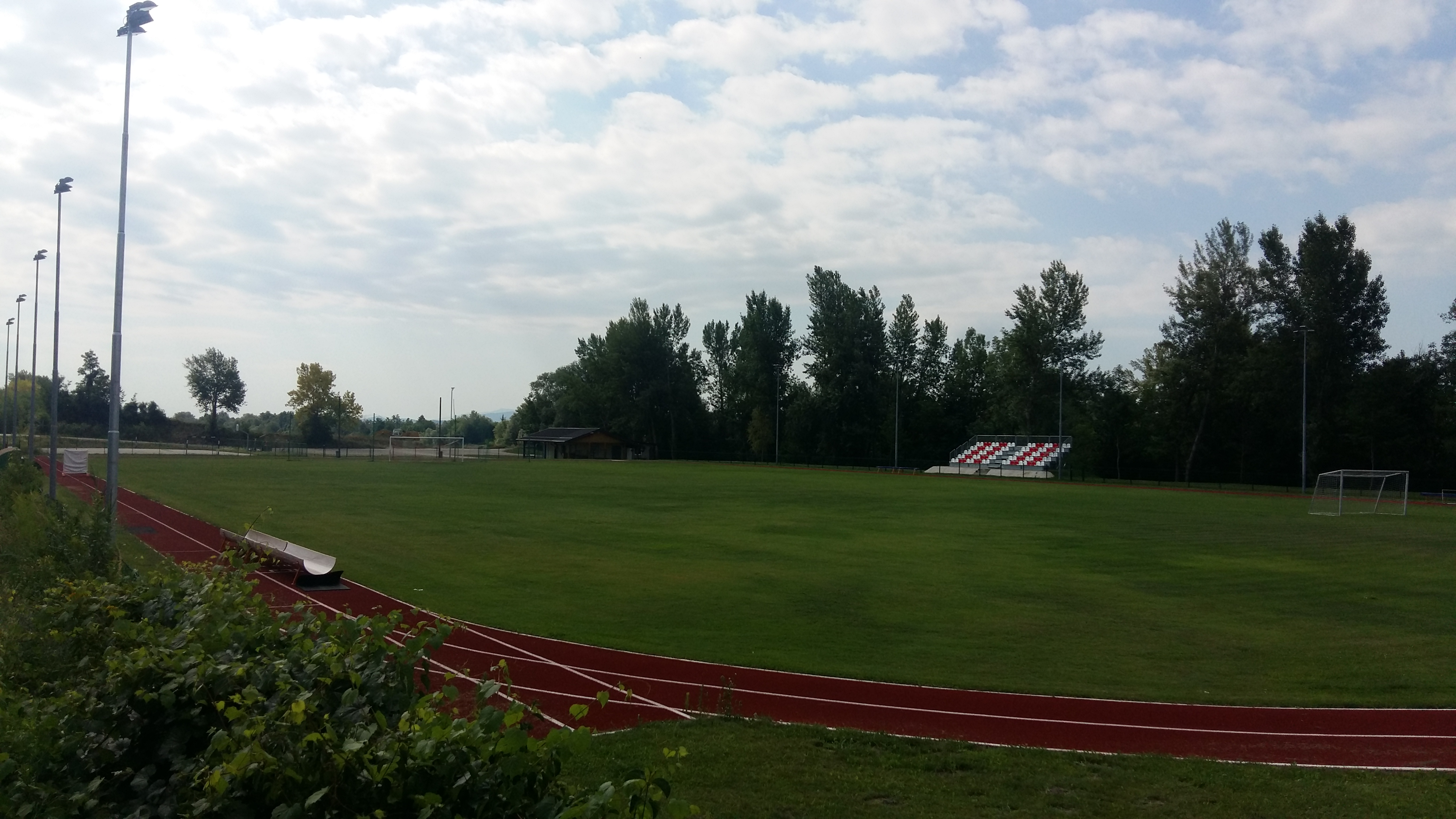 Hajdoše